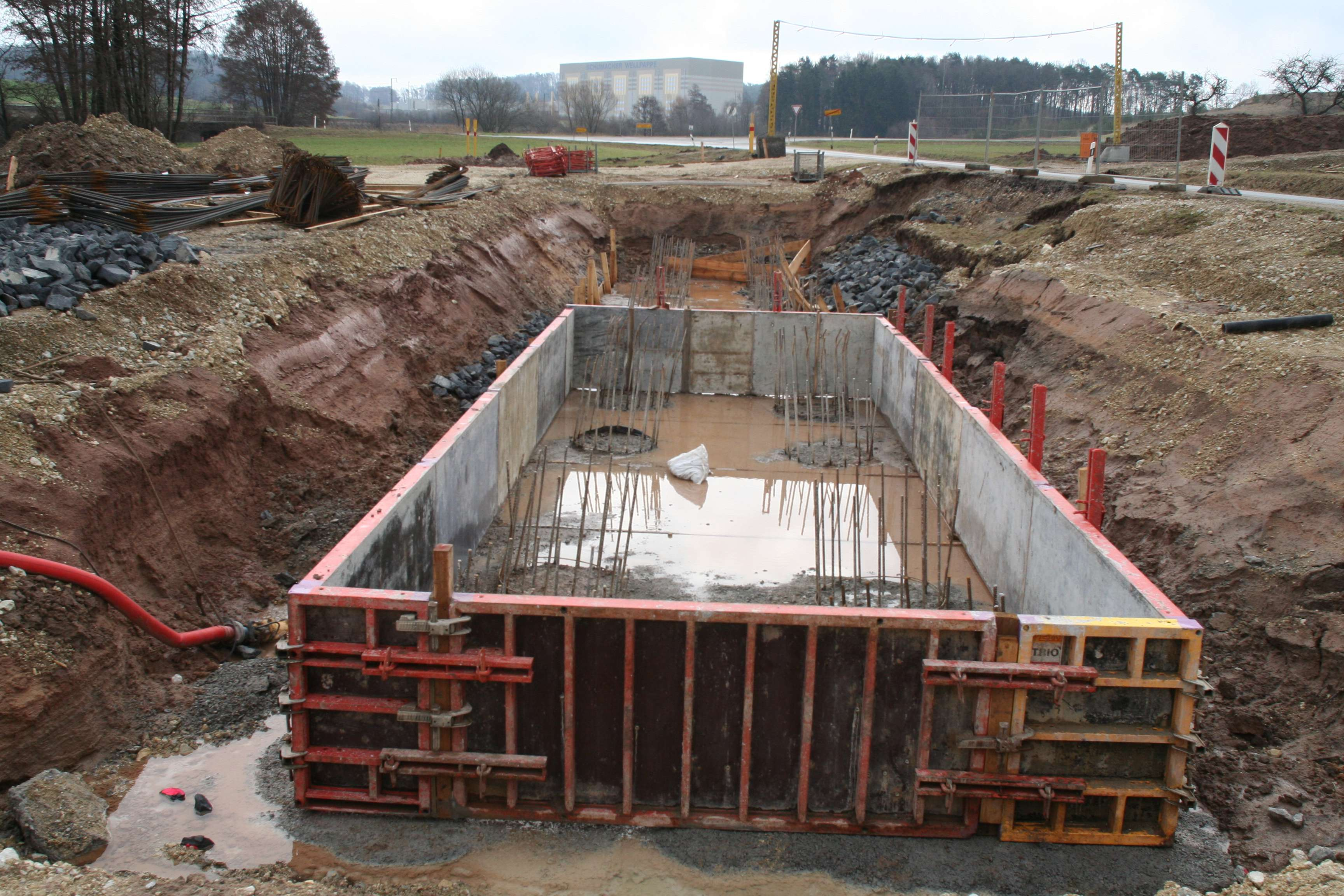 Füllbachtalbrücke, bei Zeickhorn (Grub am Forst) in Oberfranken Schalung für Pfahlkopffundament